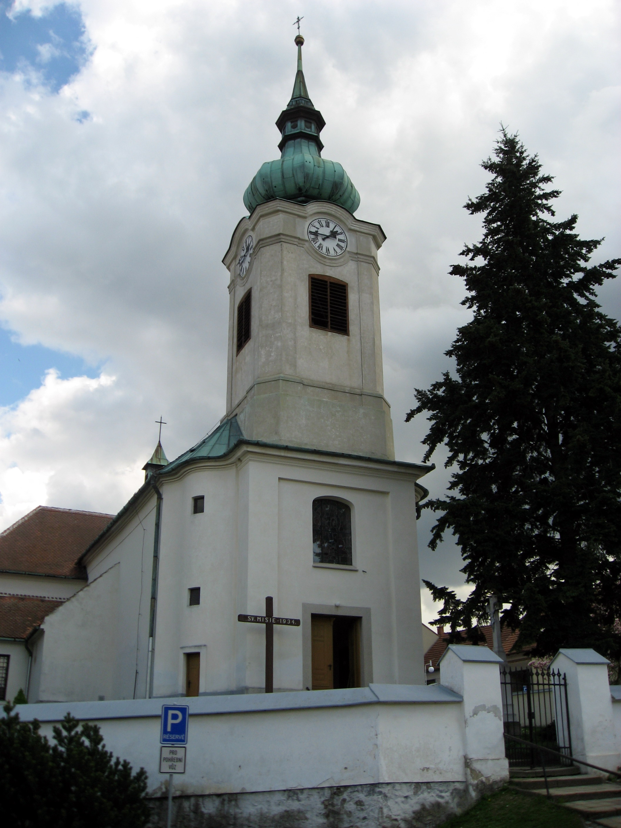 Střelice, kostel